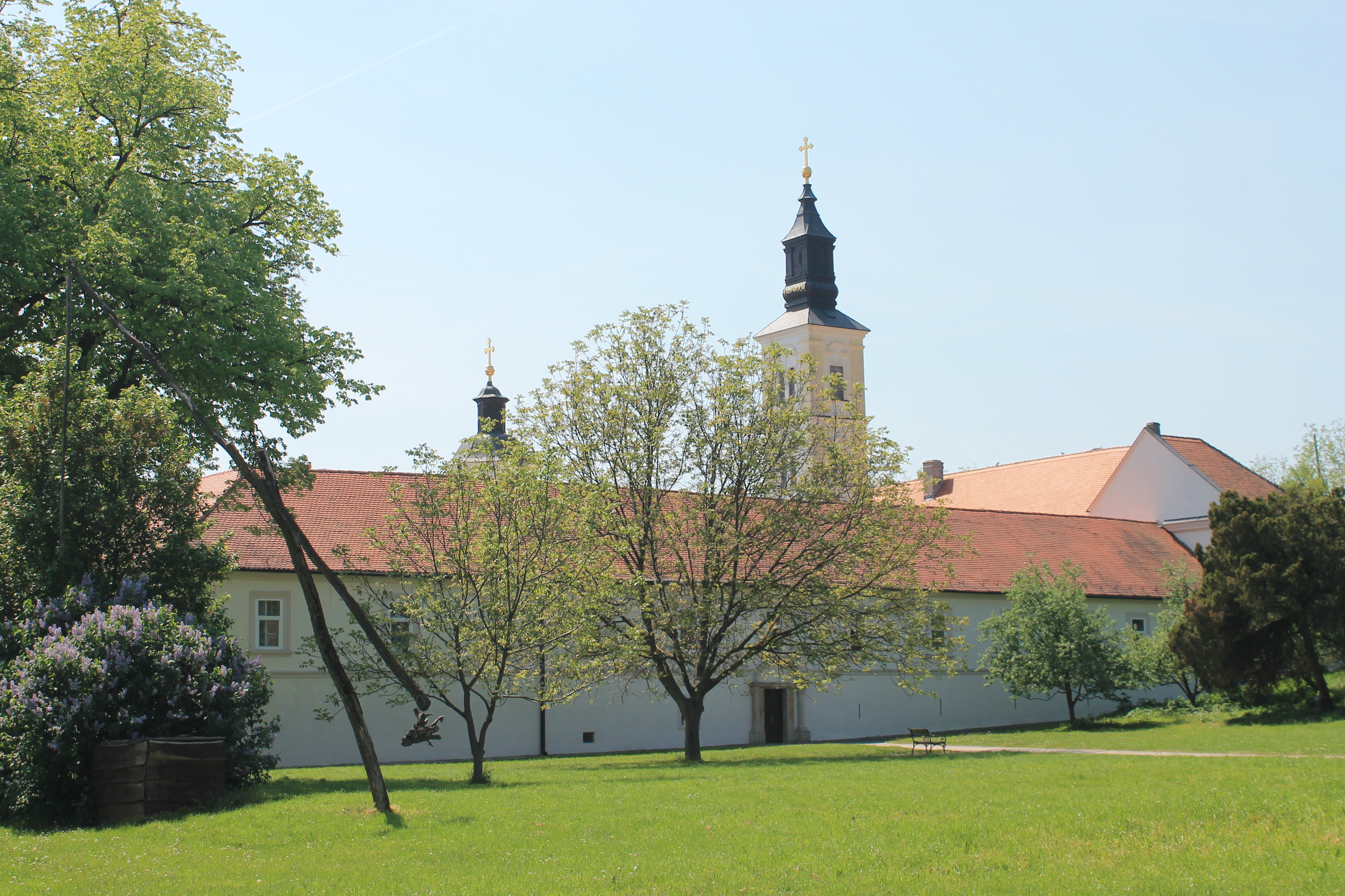 Manastir Krušedol, april 2018.